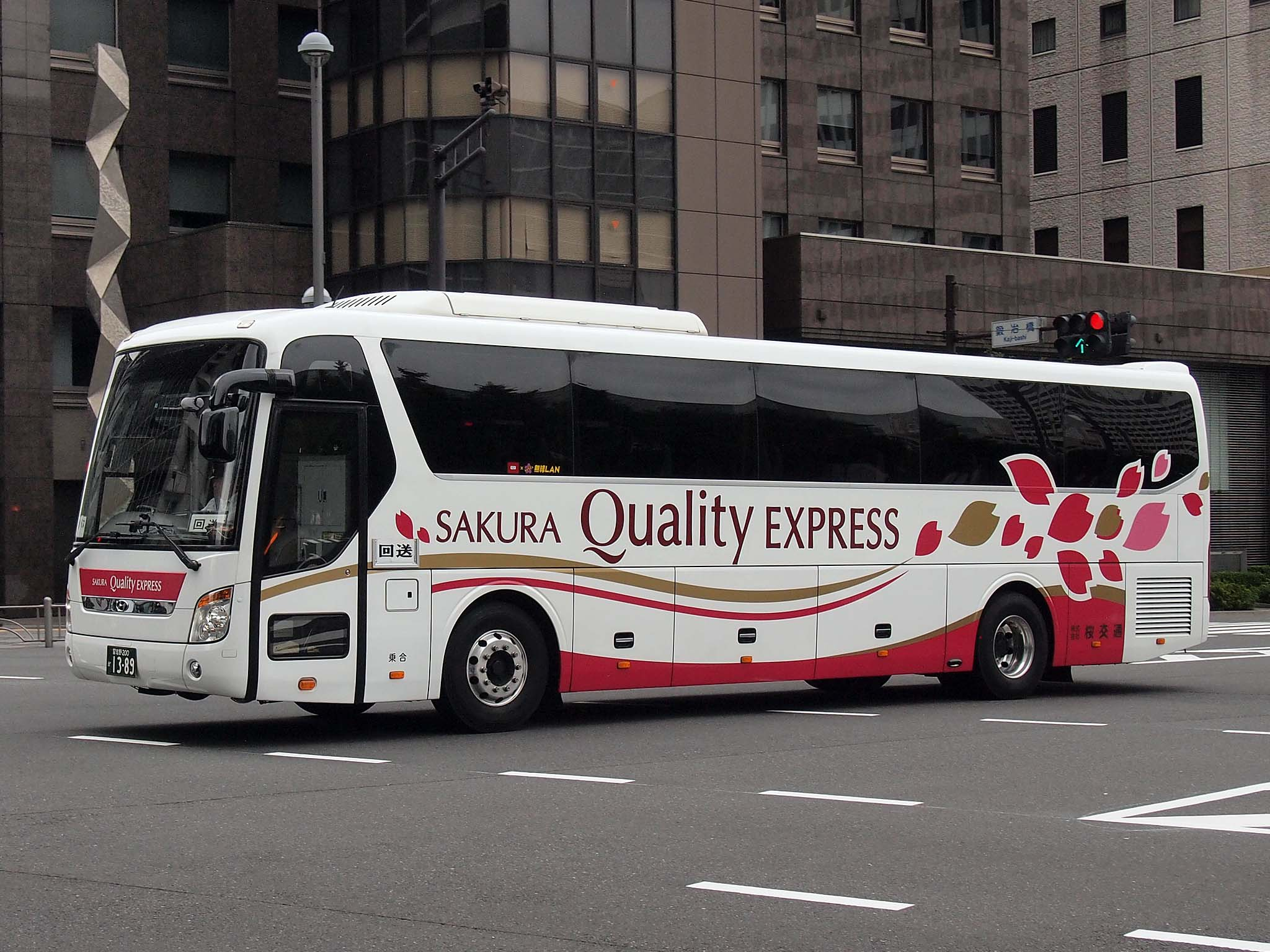 桜交通の高速バス「クオリティエクスプレス」 型式：ヒュンダイ・ユニバース RD00 登録番号：習志野200か1389 撮影地：東京都中央区、鍛冶橋交差点